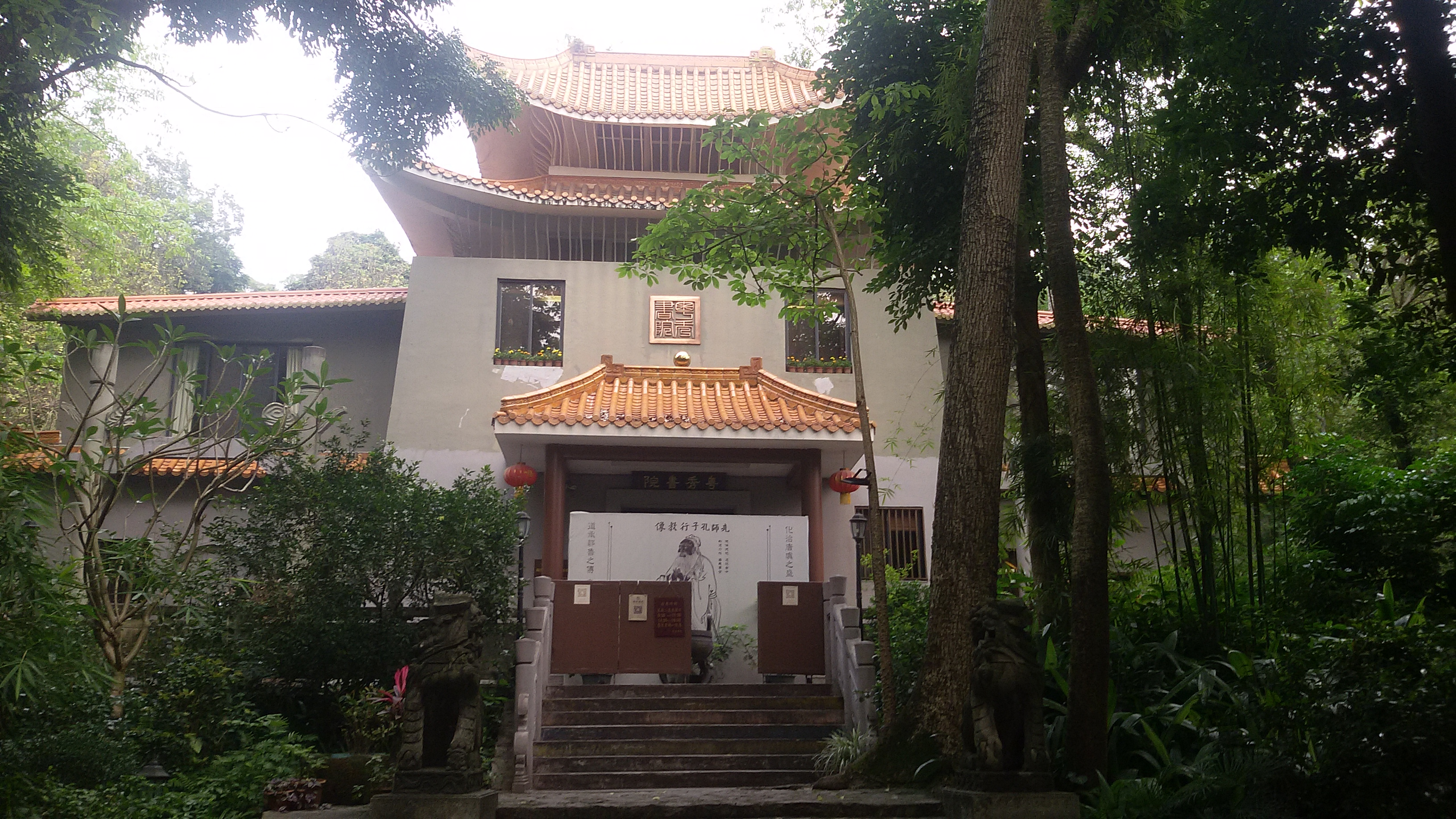 粵語: 喺越秀山上面嘅粵秀書院